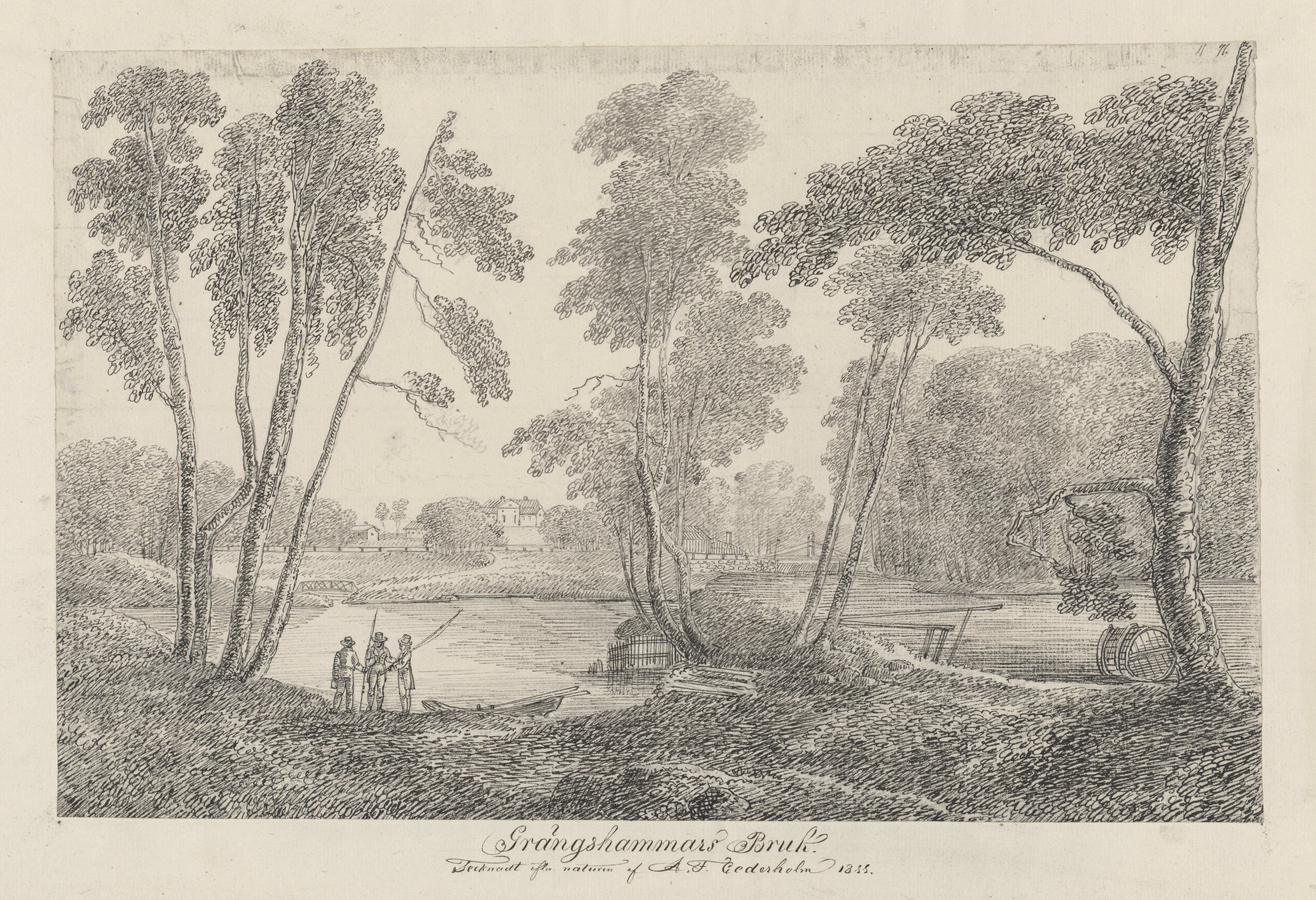 "Grängshammars Bruk Tecknadt efter naturen af A. F. Cederholm 1811". Vy över en park vid Grängshammars bruk. I förgrunden tre män med fiskespö.